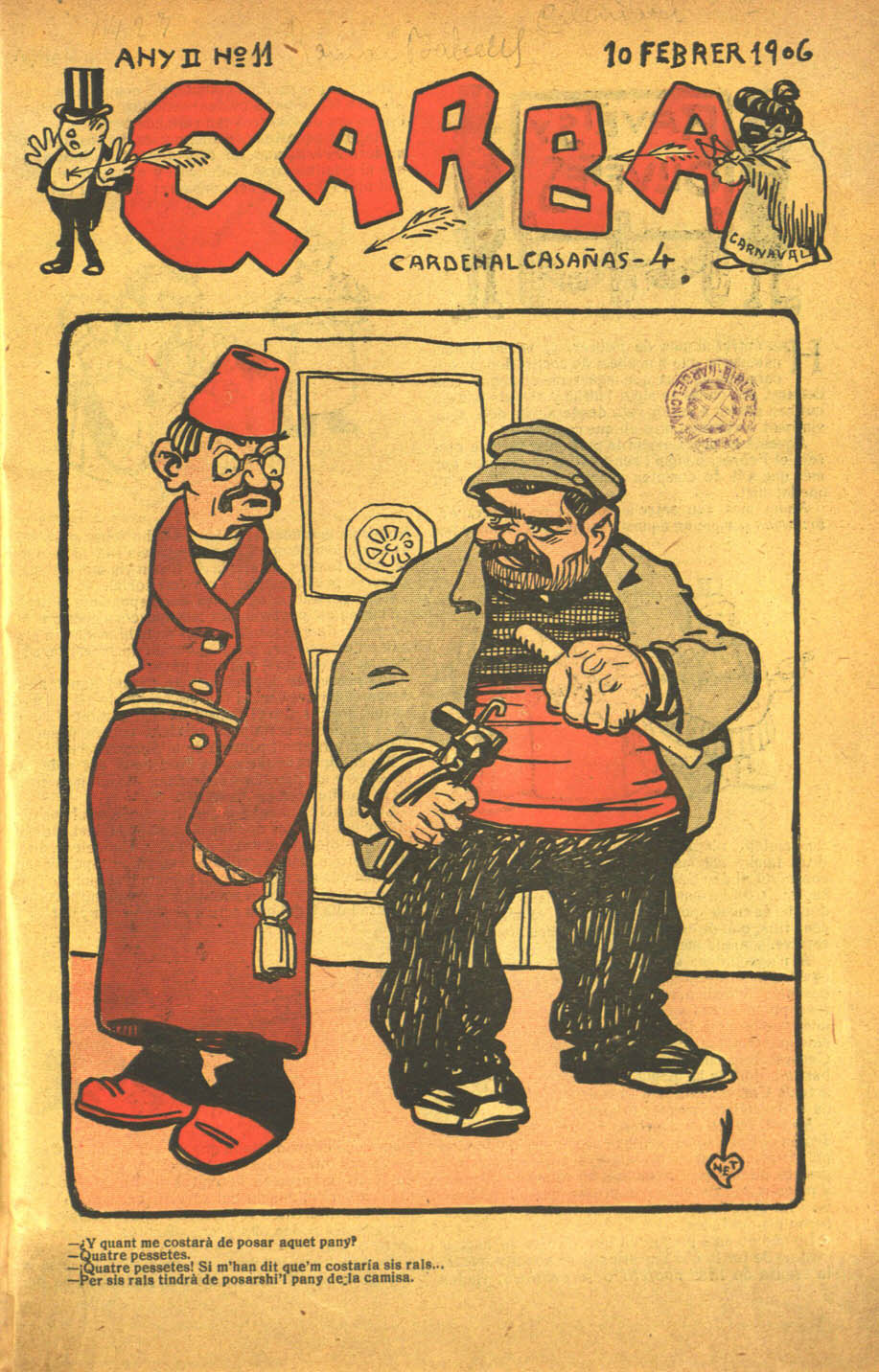 Garba (revista)